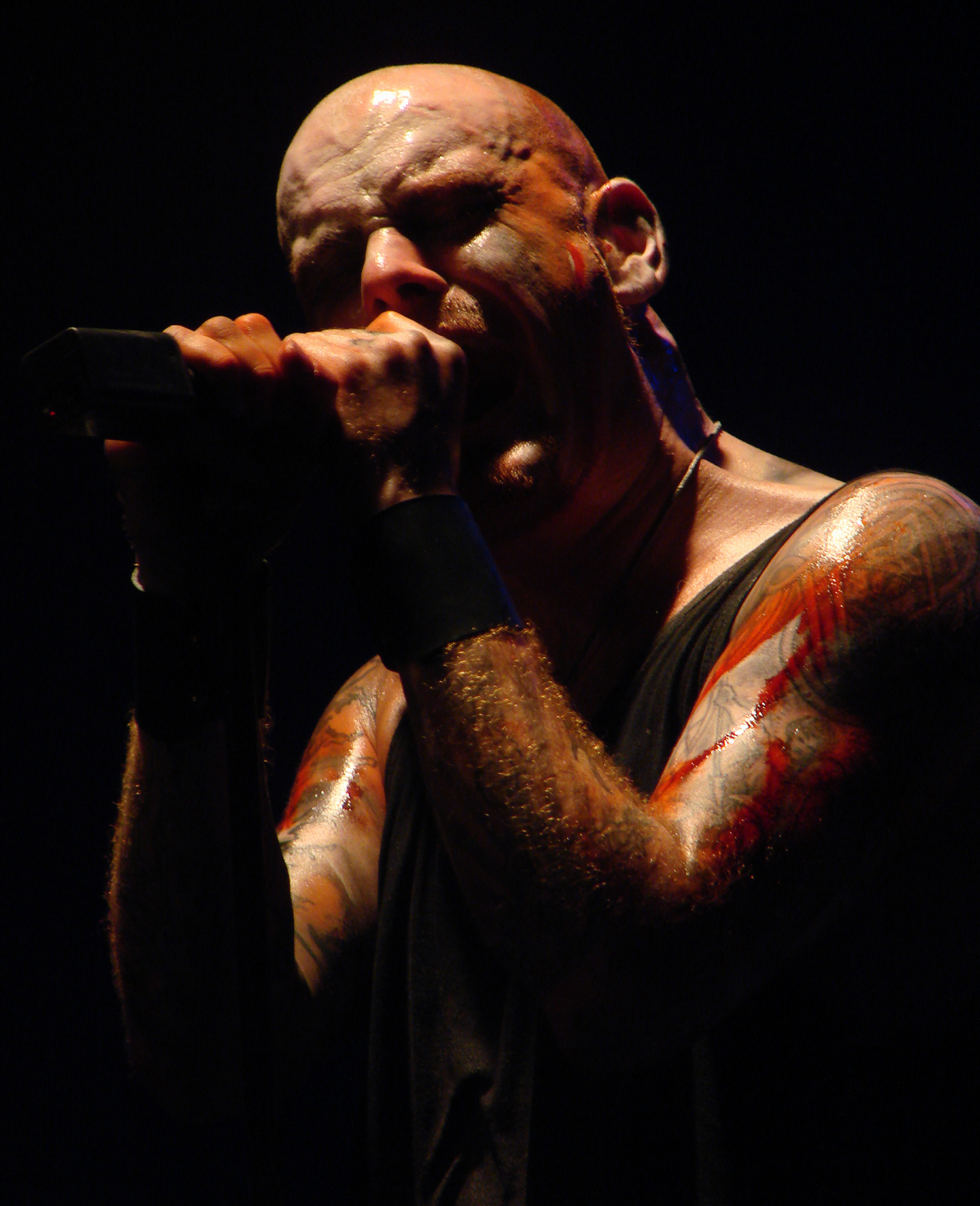 Primordial en concert à la Locomotive, à Paris, pendant le Heidenfest Tour 2008.